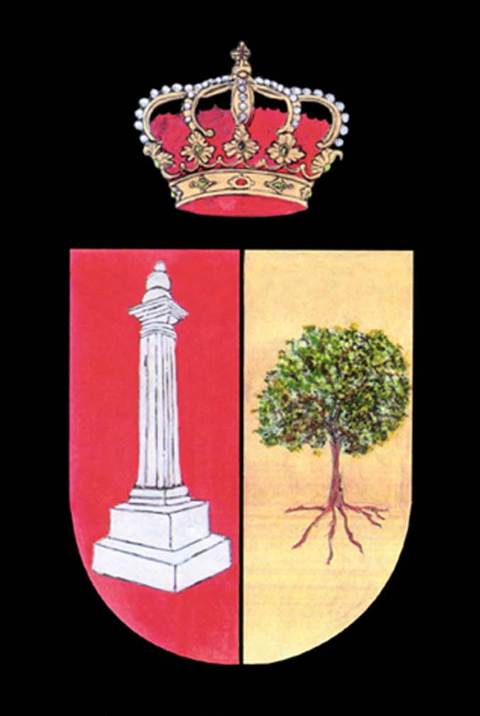 Escudo de Barca (Soria, España)